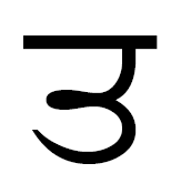 тутта